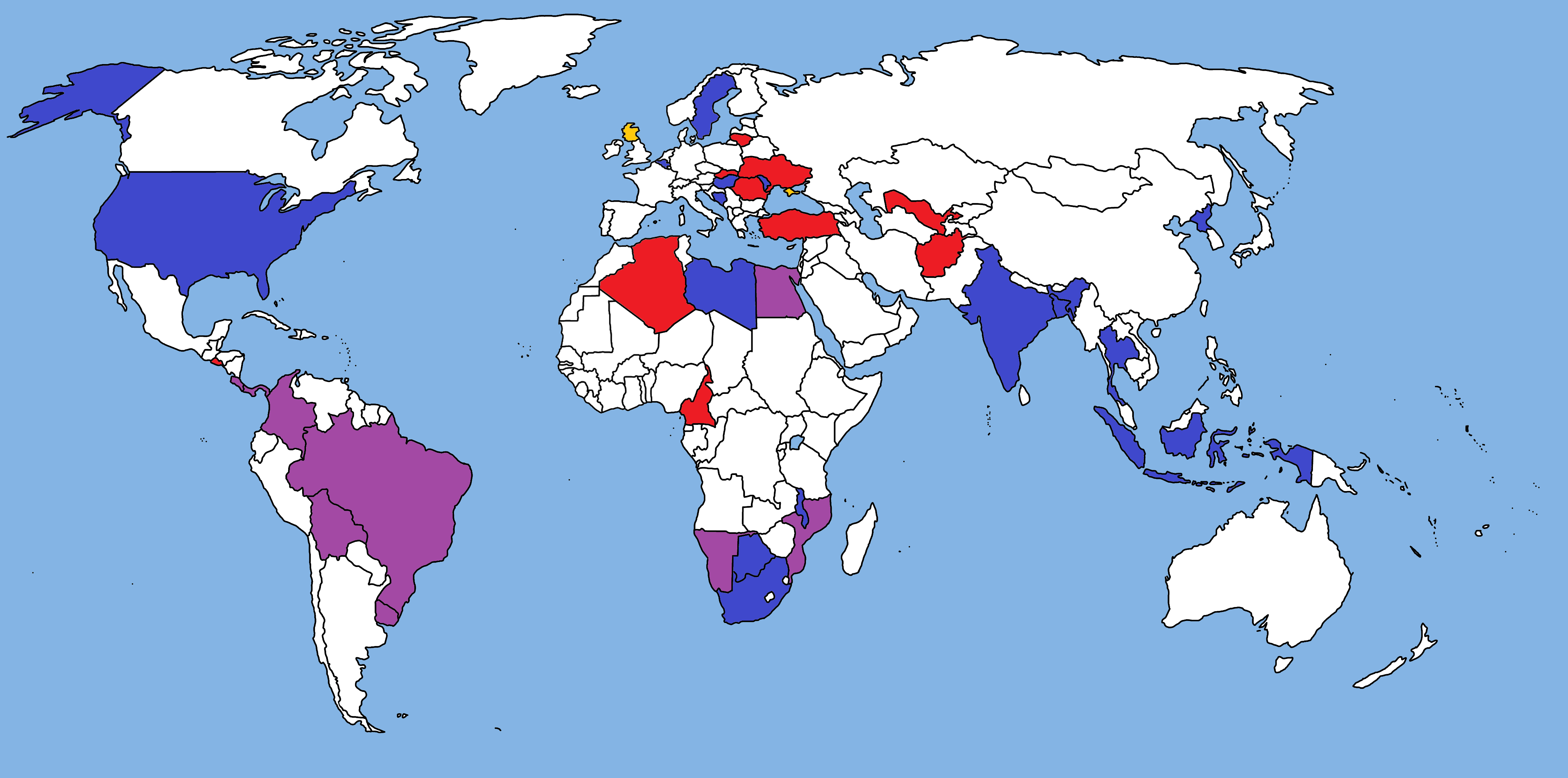 Карта государств, где в 2014 году пройдут выборы